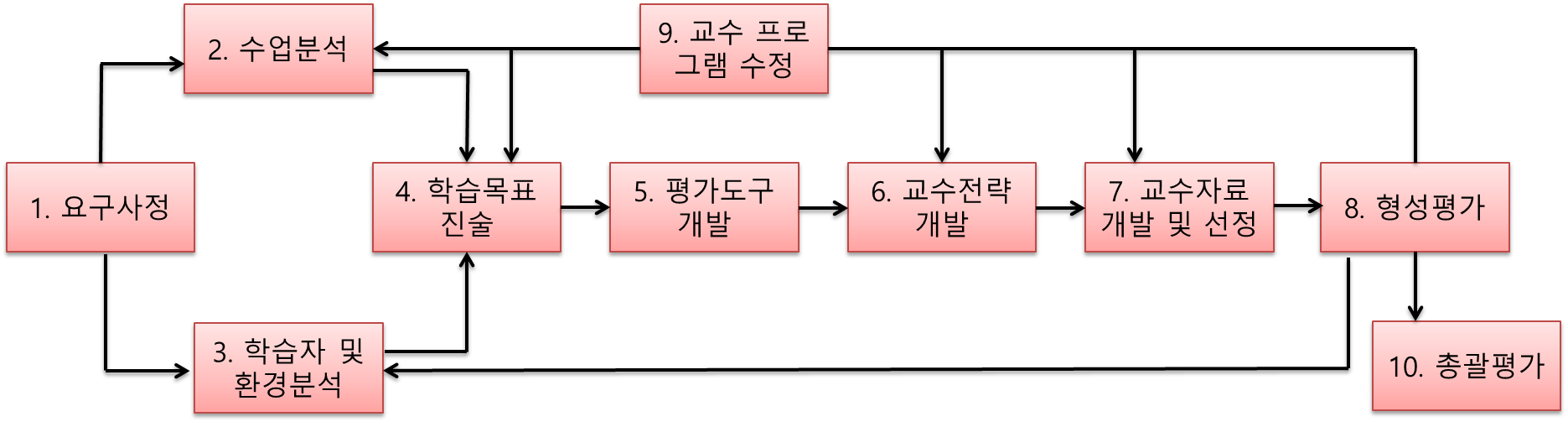 조선말: Dick & Carey 모형 단계입니다.